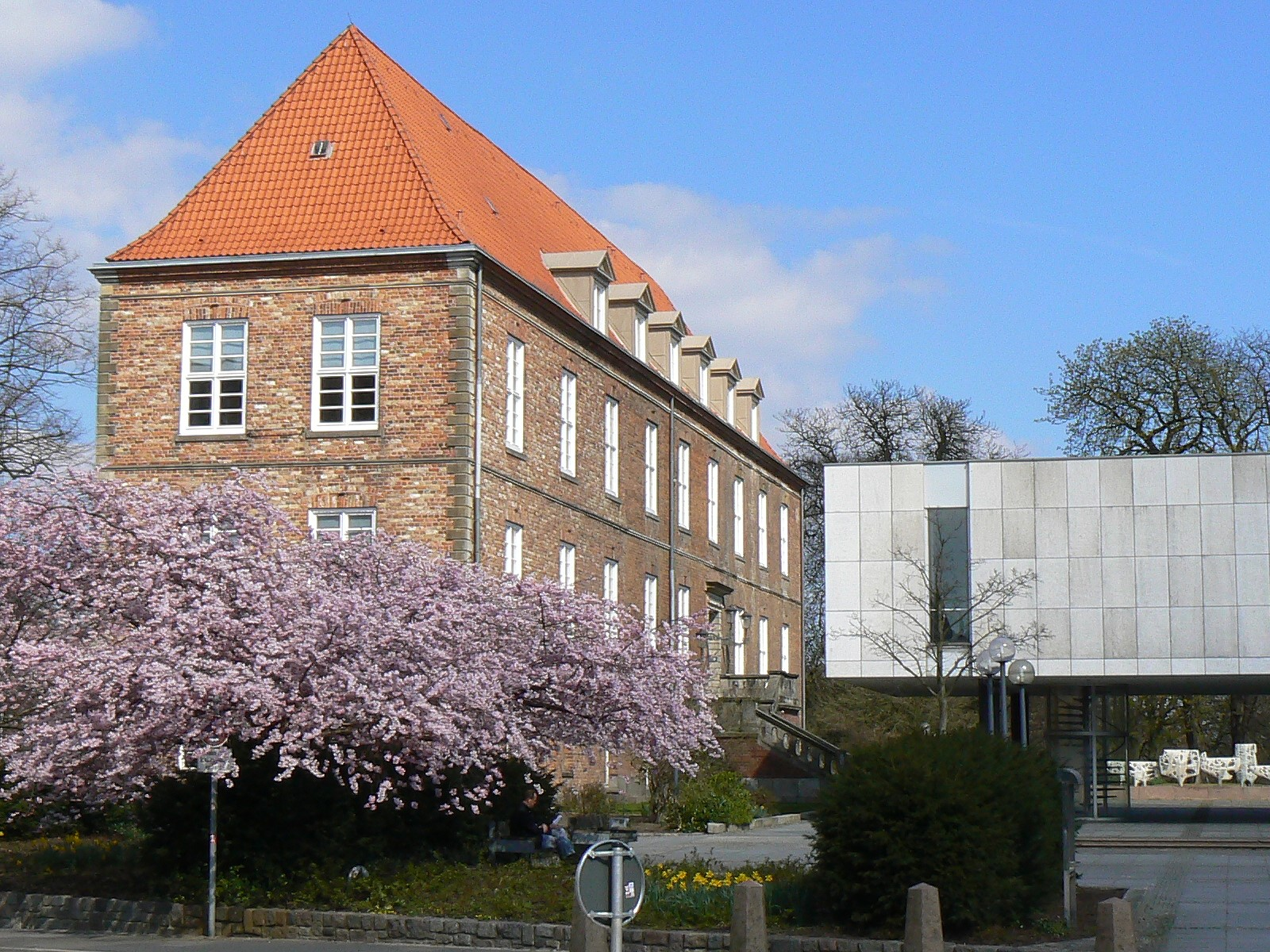 Kieler Schloss. Rantzaubau, Blick von Süden.